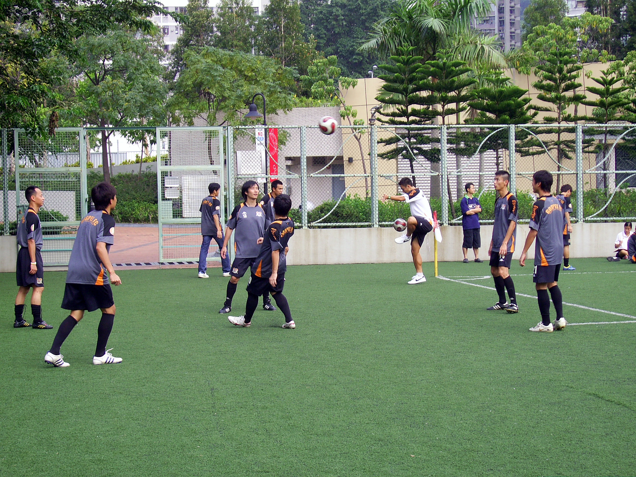 中文（香港）: 聖約瑟賽前熱身